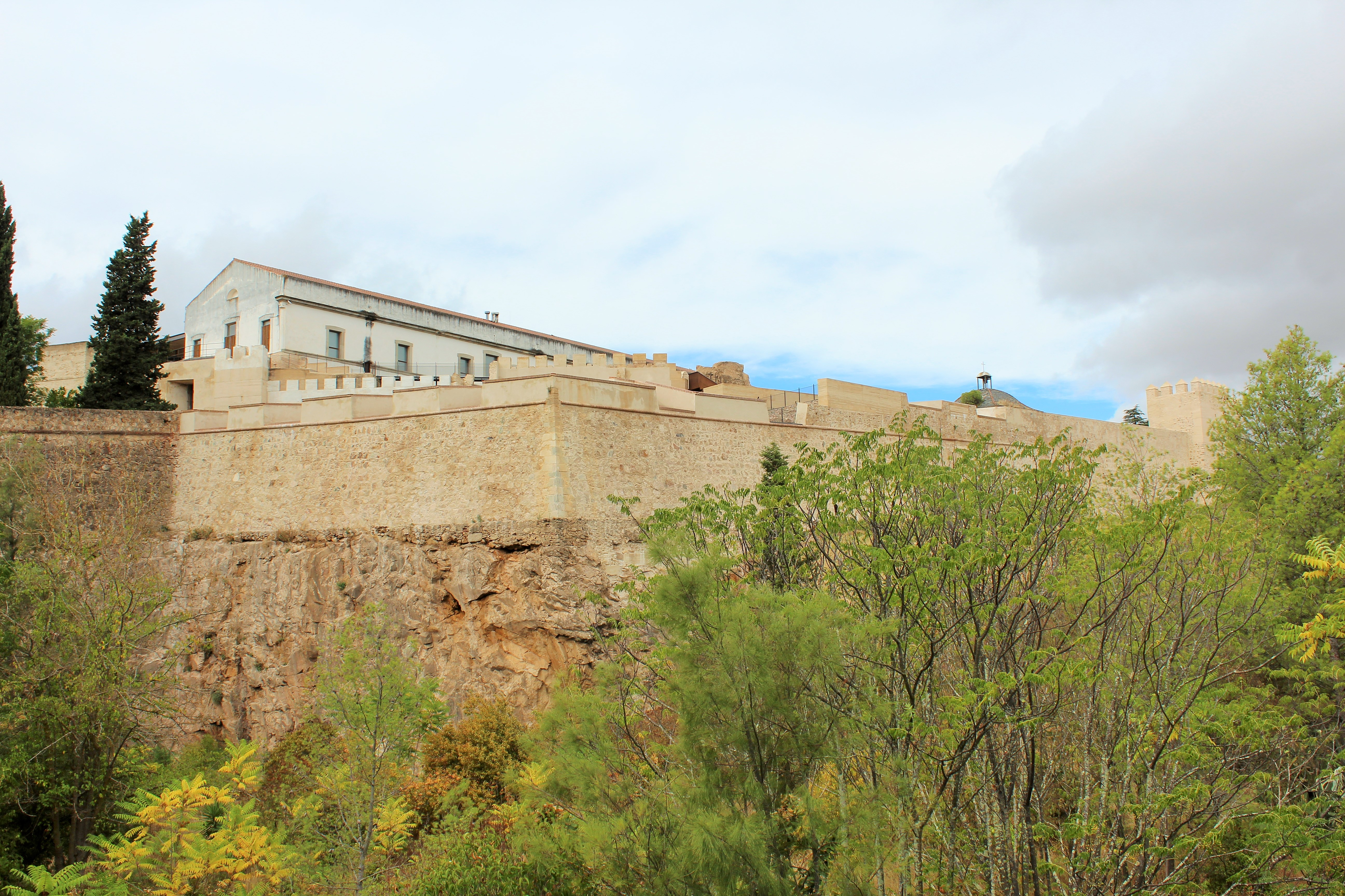 Lienzos con esquinas muy elevados sobre roca.